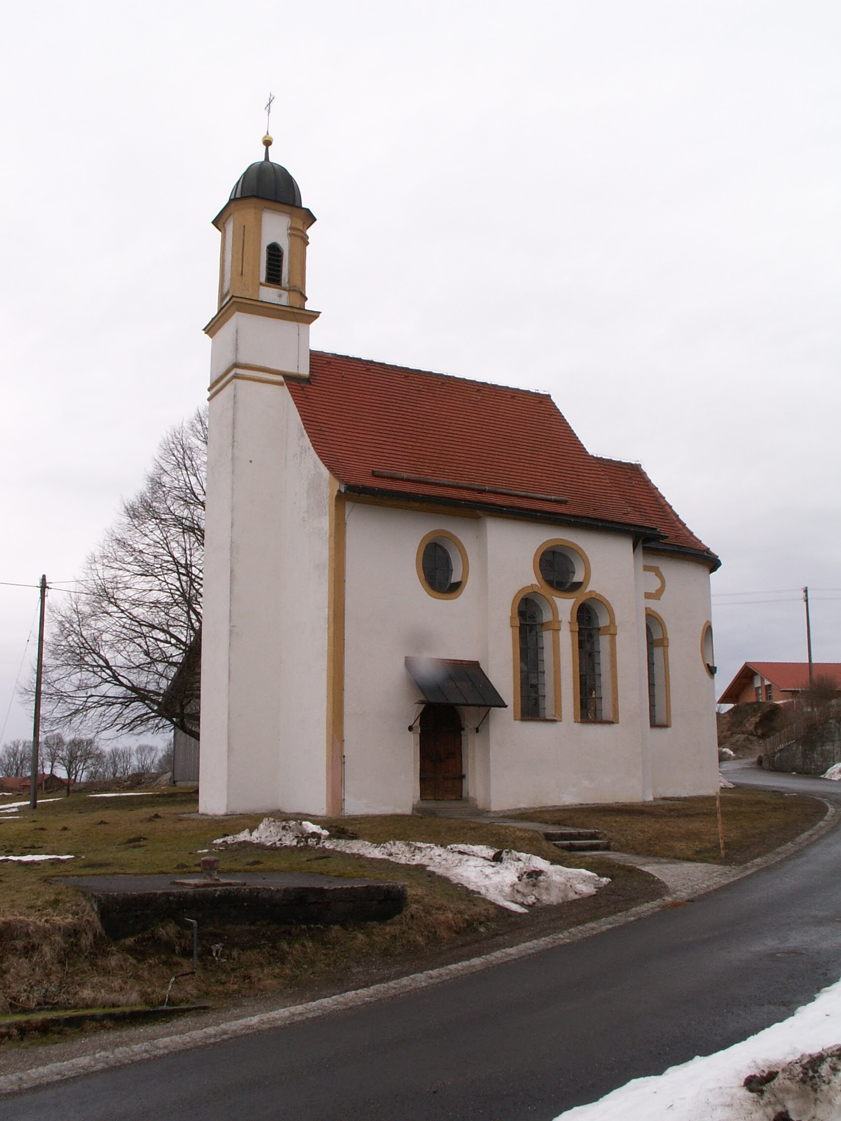 Kapelle in Echerschwang, Bernbeuren